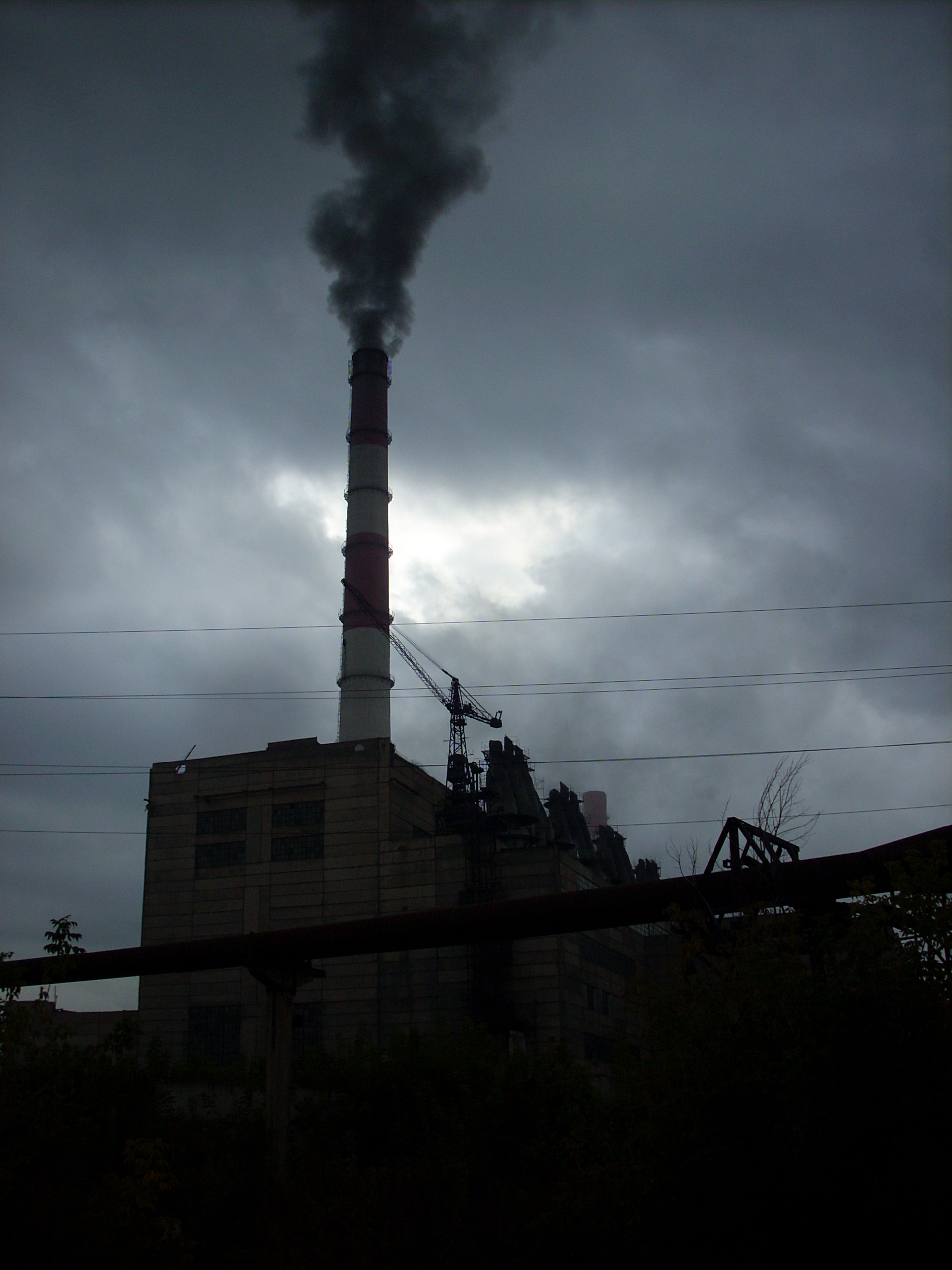 Тайны Барнаула